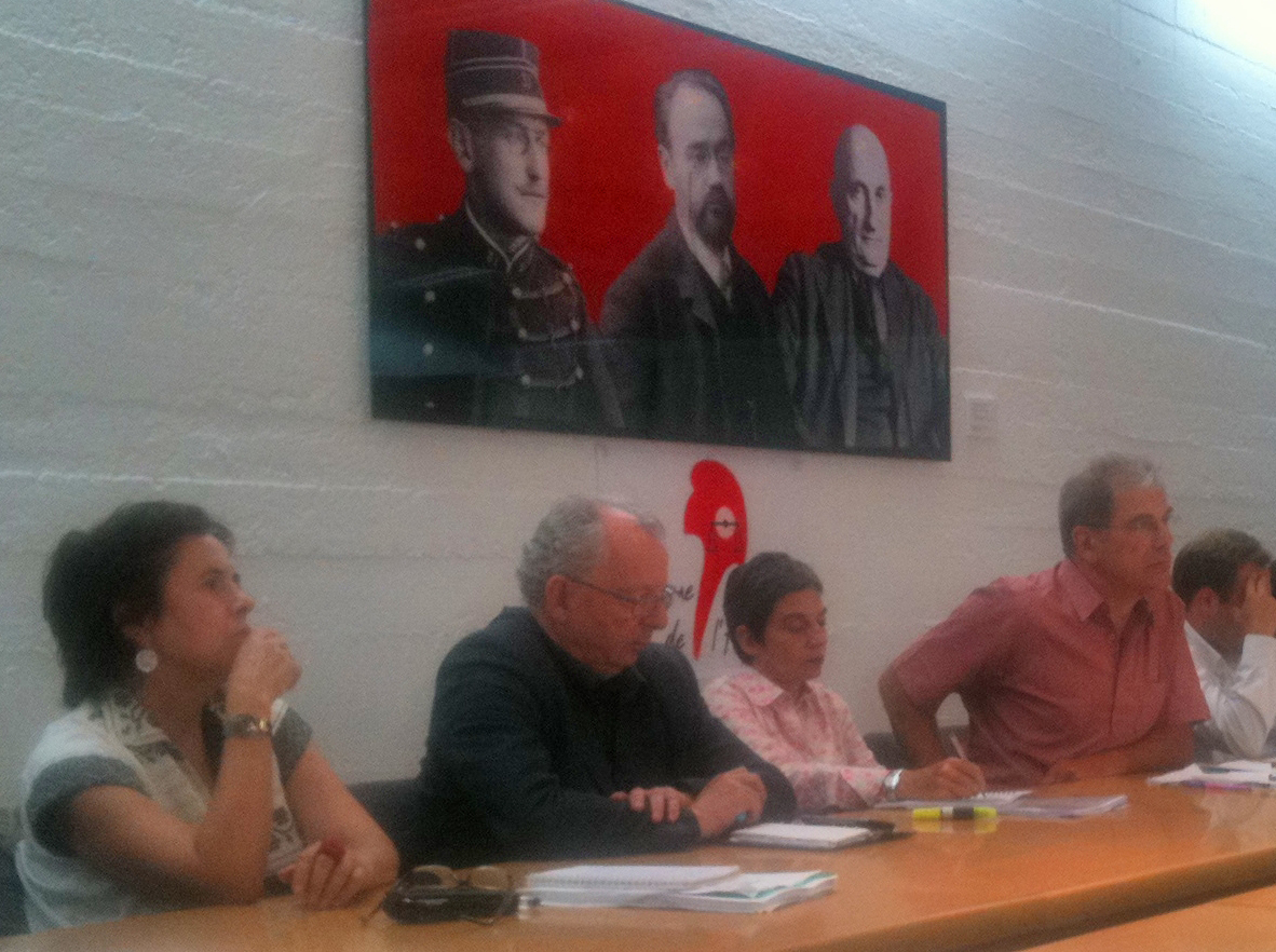 La syndicaliste Annick Coupé (à gauche) et le président de la LDH Jean-Pierre Dubois sous les portaits du capitaine Dreyfus, d'Emile Zola et de ?? .